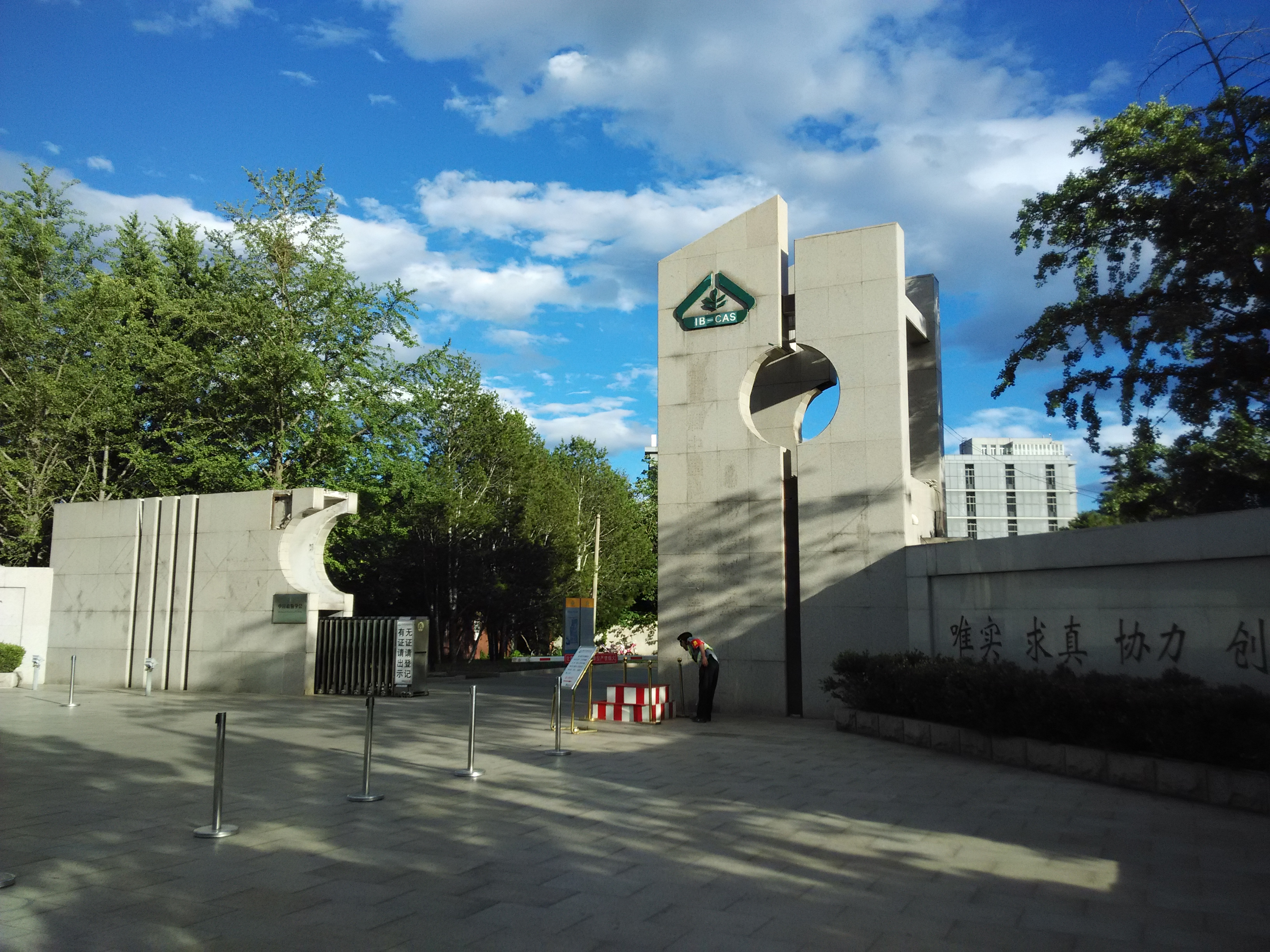 中文（中国大陆）: 这是植物研究所的正门。